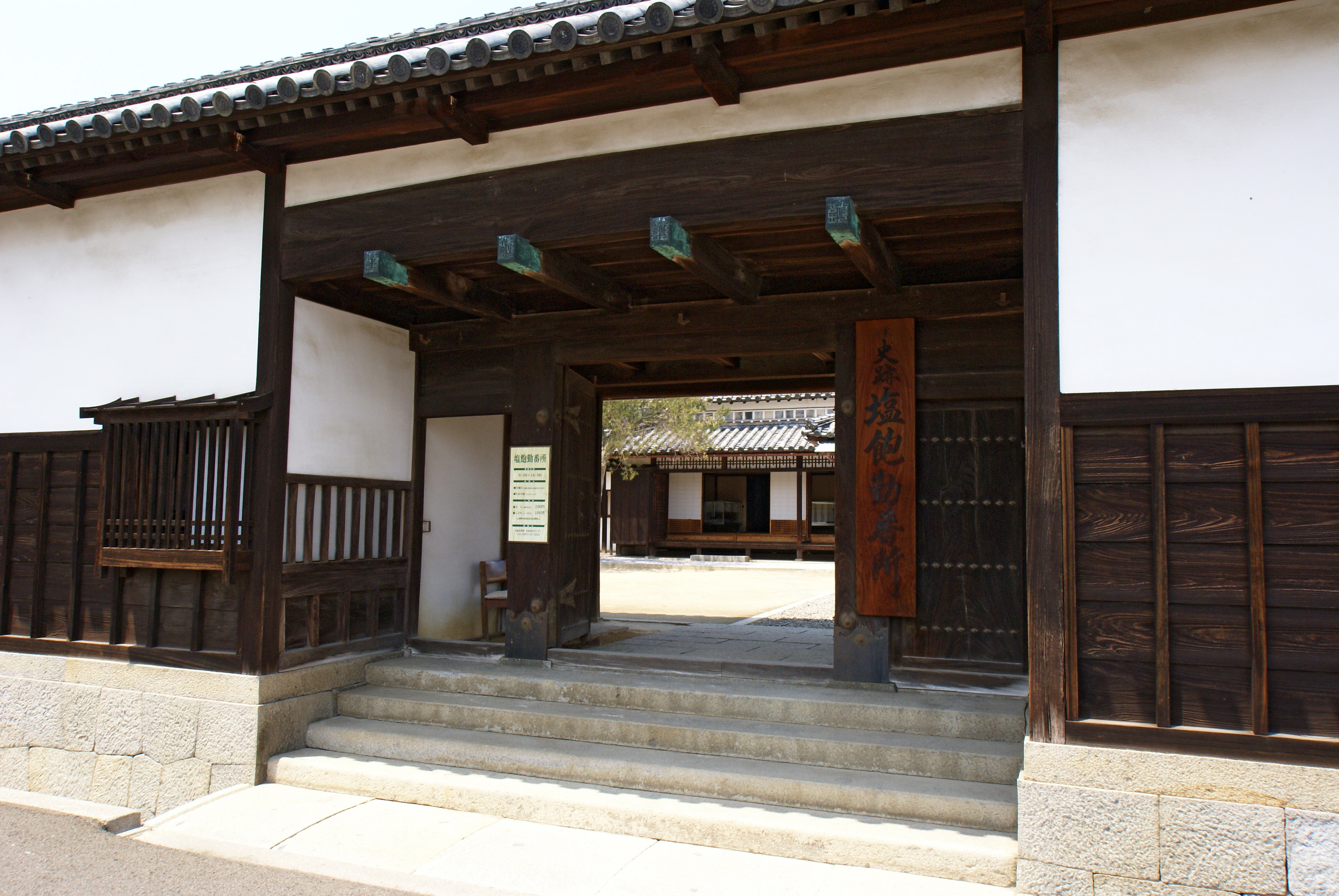 Shiwaku-kinbansho, Hon-jima of Shiwaku Islands (Marugame, Kagawa prefecture, Japan)